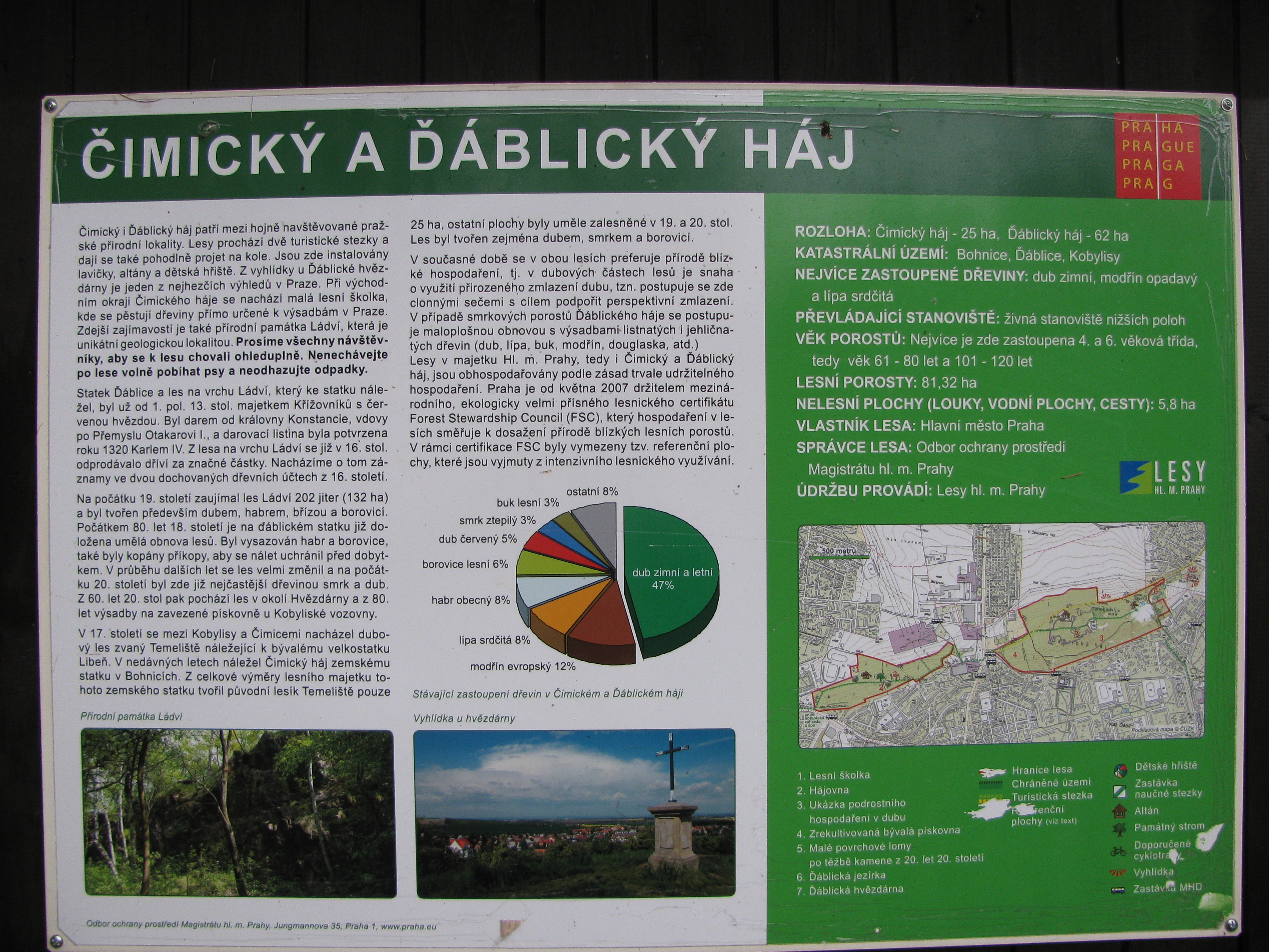 Informační tabule poskytuje návštěvníkům základní informace o Ďáblickém háji.